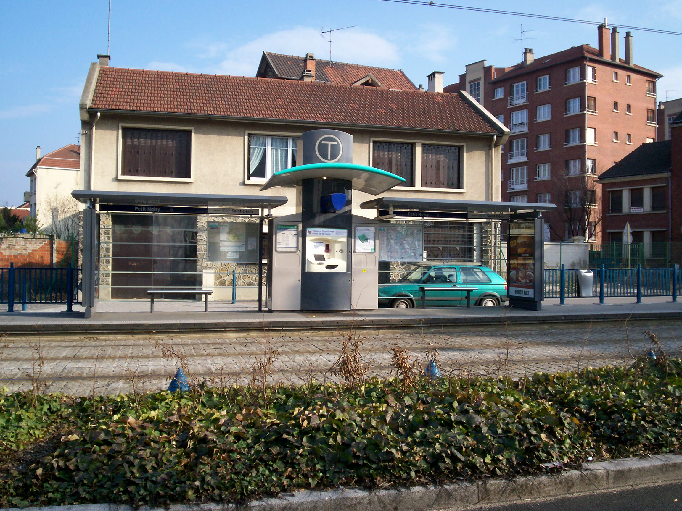 Abri voyageurs à Petit Noisy